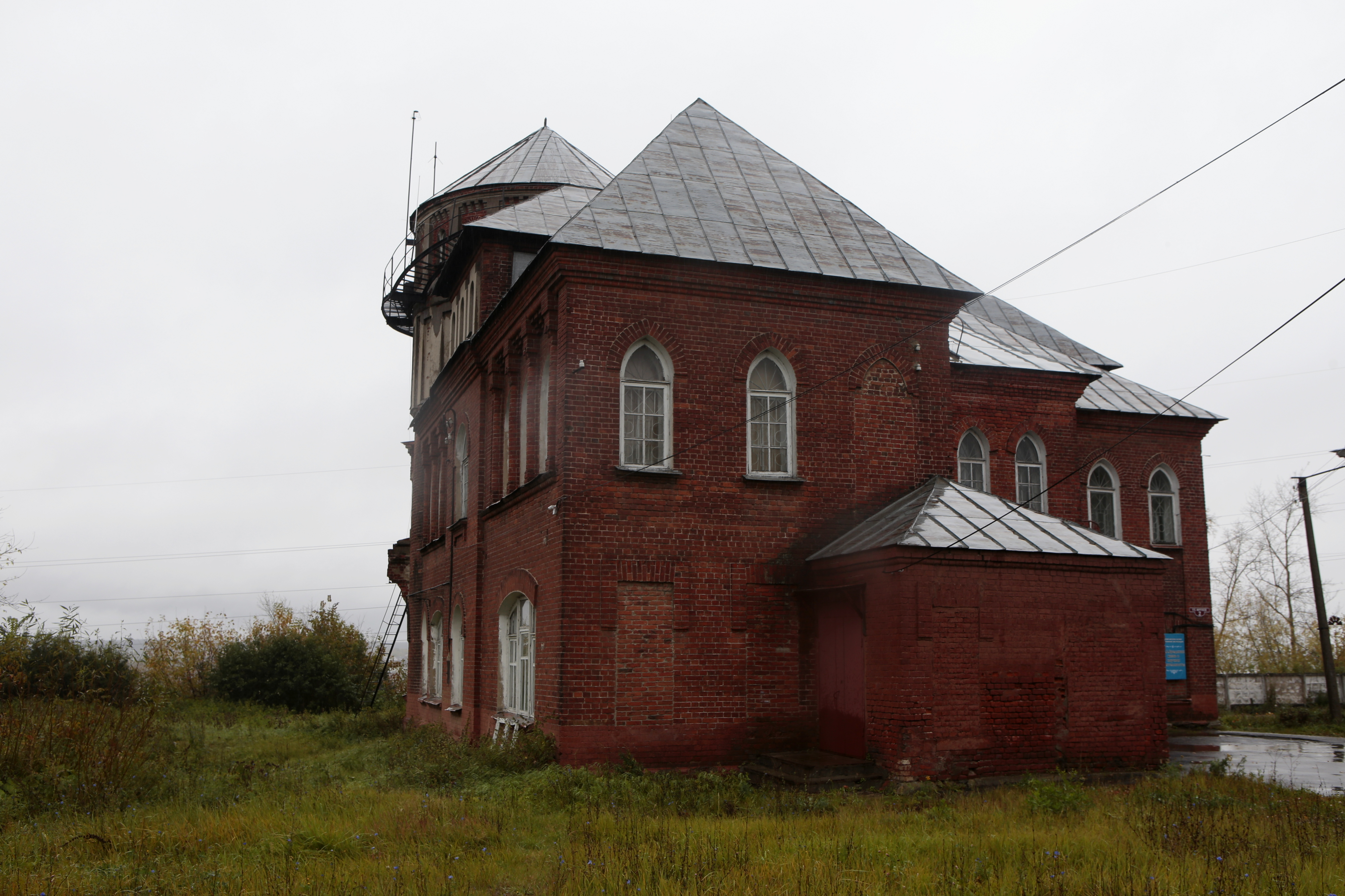 1907 г. постройки